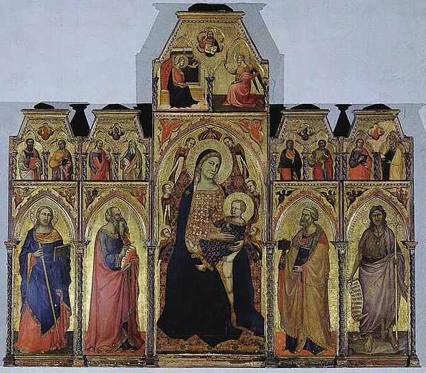 Polittico di Taddeo Gaddi in San Giovanni Fuorcivitas a Pistoia.